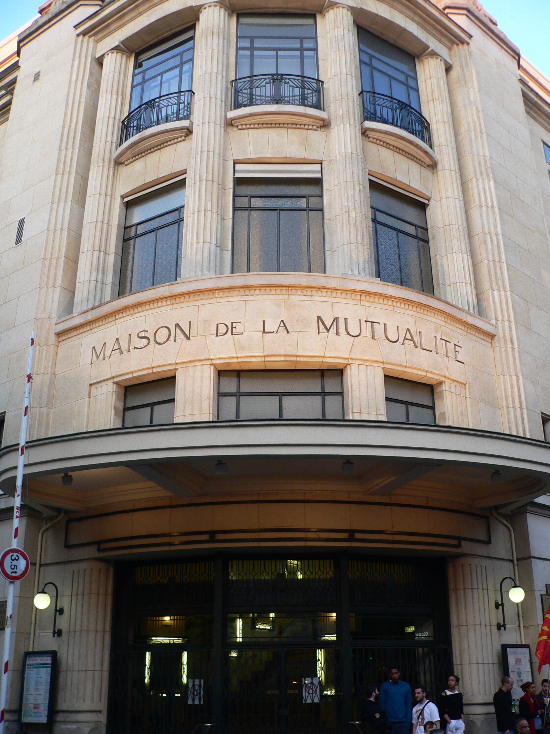 Meeting d'Olivier Besancenot le 18 avril 2007 à la Maison de la Mutualité, Paris 5ème: la foule déborde